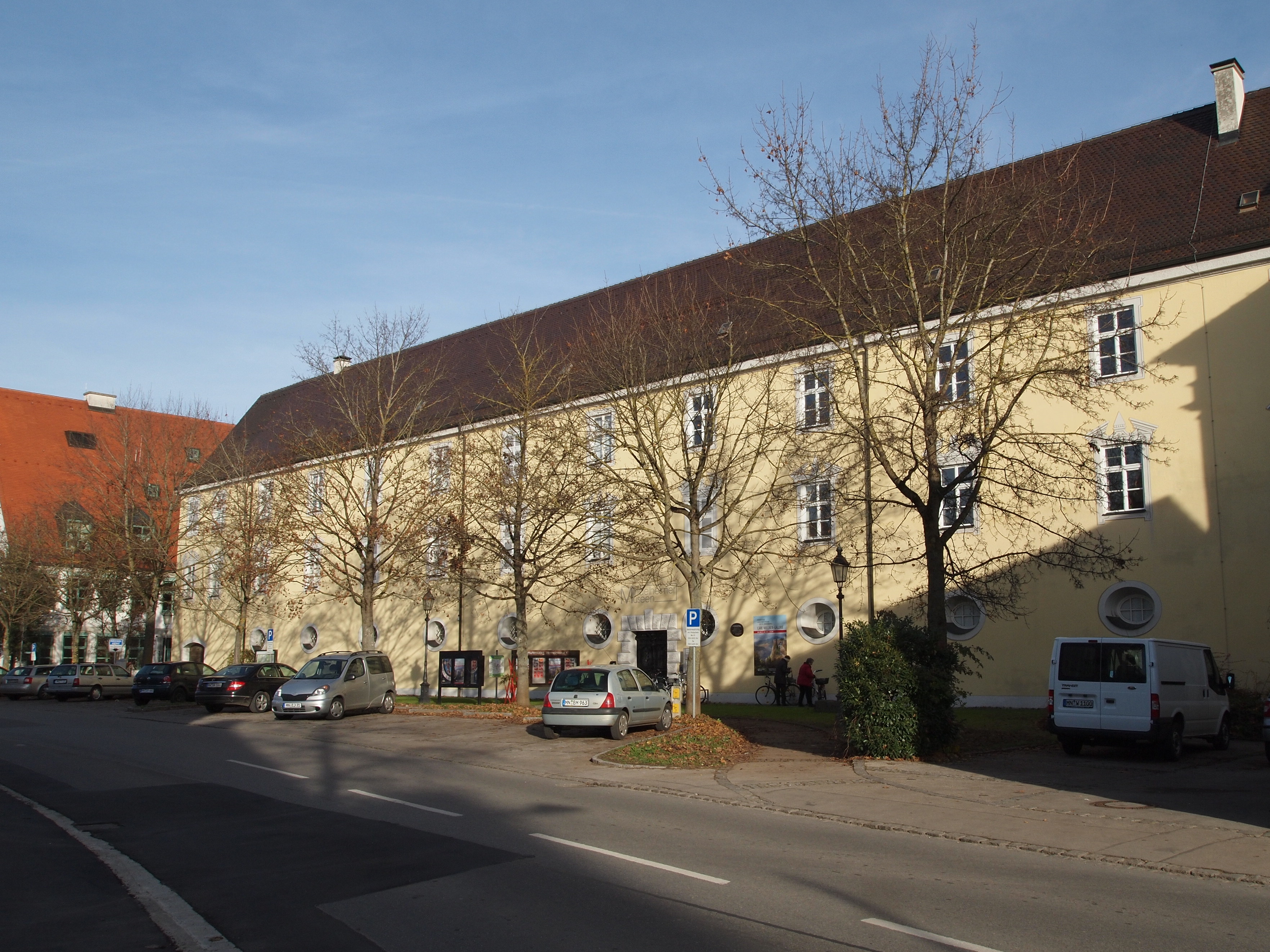 Mindelheim, Westflügel des ehem. Jesuitenkollegs, heute Mindelheimer Museen